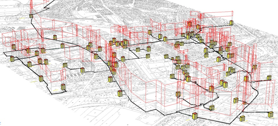 Program HESCOnet® je využíván projektanty při navrhování jak nových, tak i při projekčních přepočtech stávajících tepelných soustav.